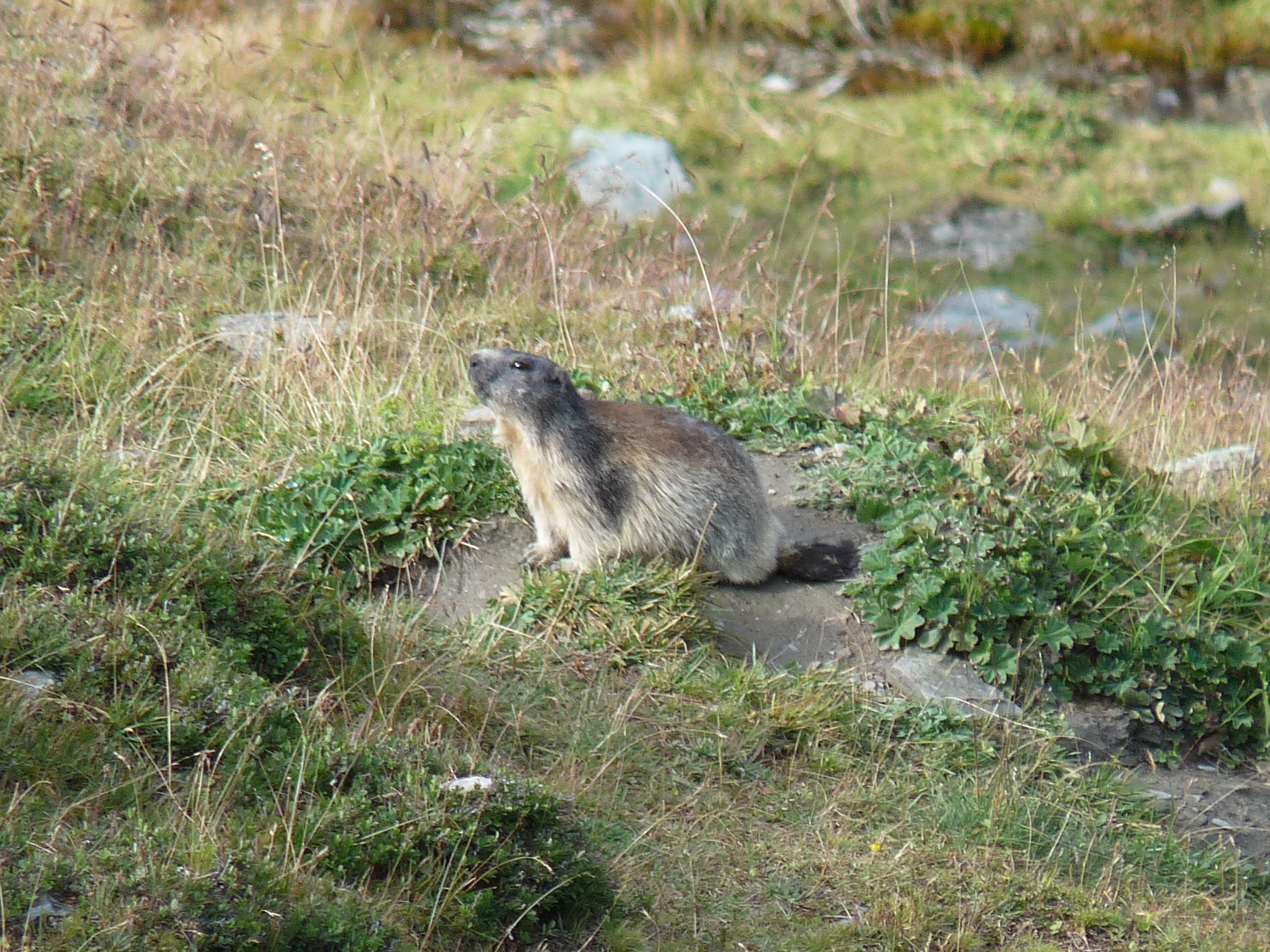 Marmotte sur les hauteurs de Zinal (Valais, Suisse), en direction de Sorebois